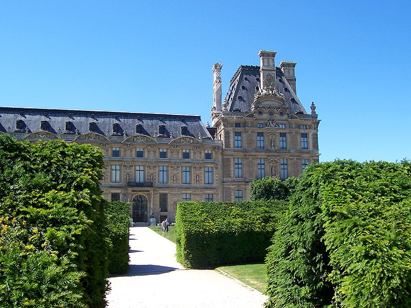 Parigi - Palais du Louvre (Pavillon de Flore)